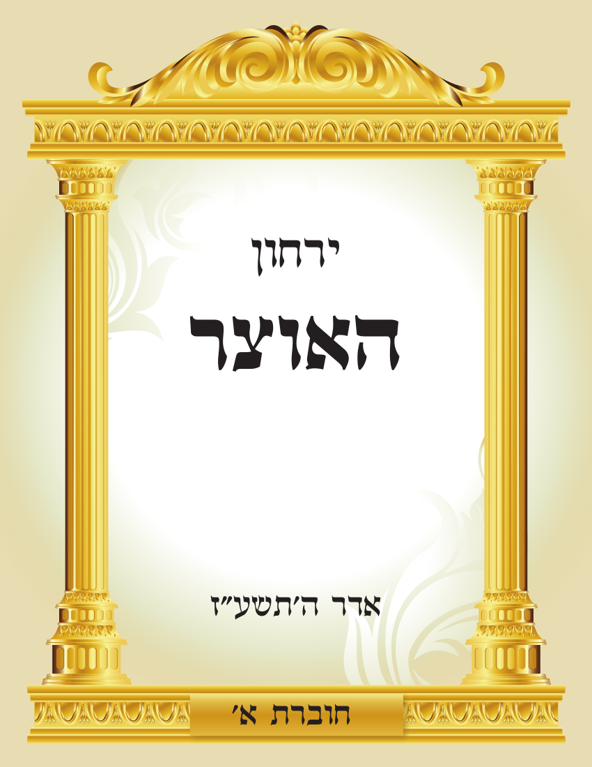 שער הגיליון הראשון של ירחון האוצר